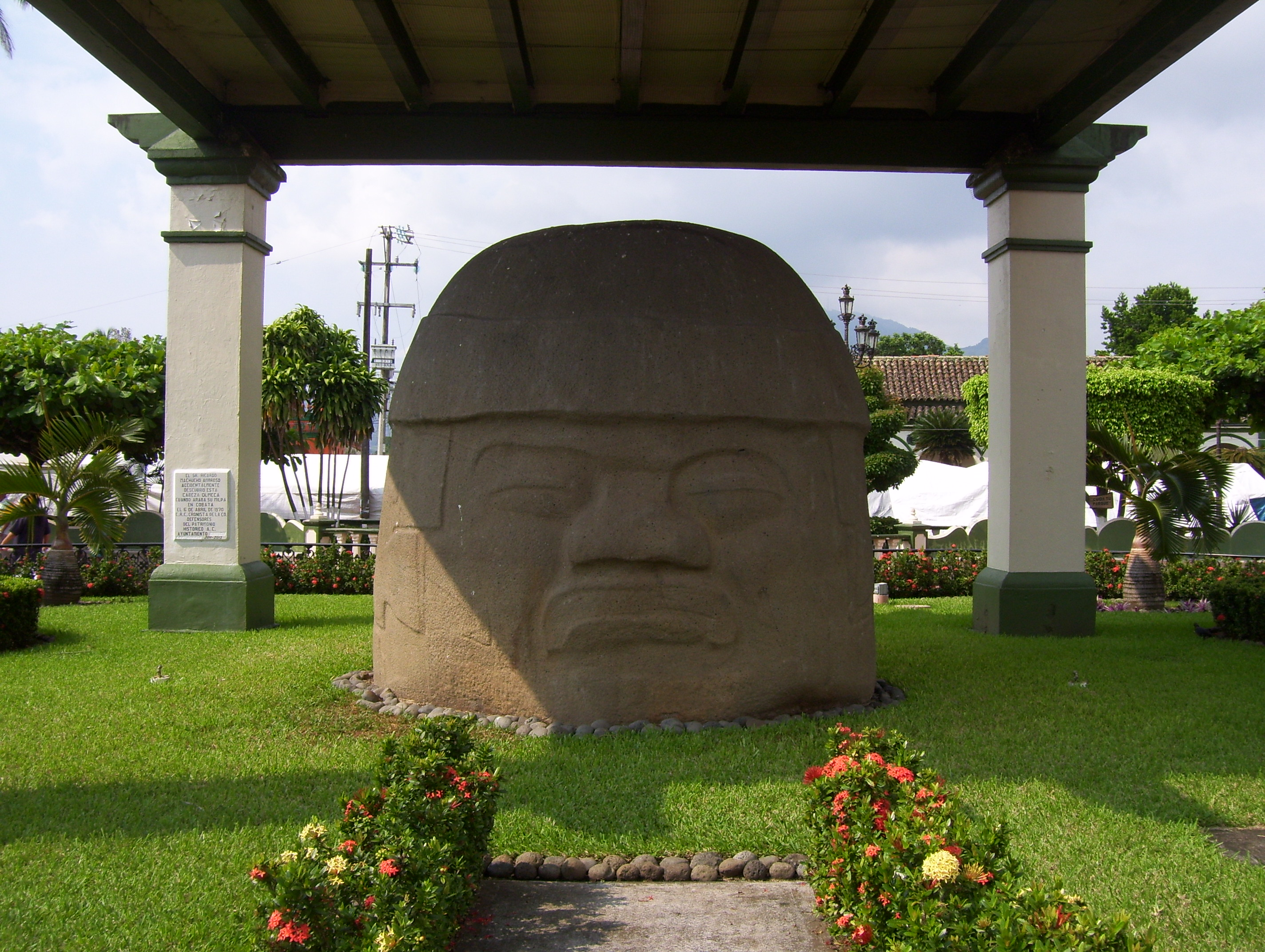 Cabeza monumental olmeca, exhibida en la plaza principal de Santiago Tuxtla